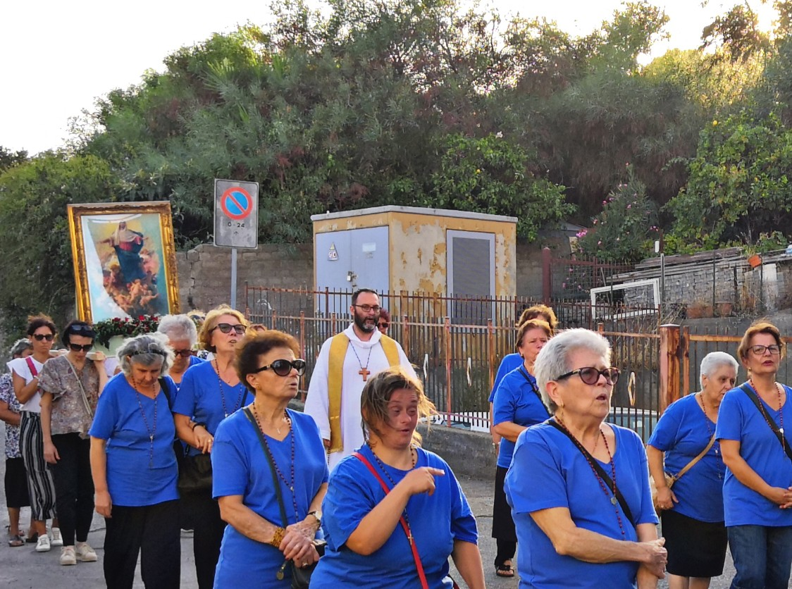 Foto di Santa Maria Assunta